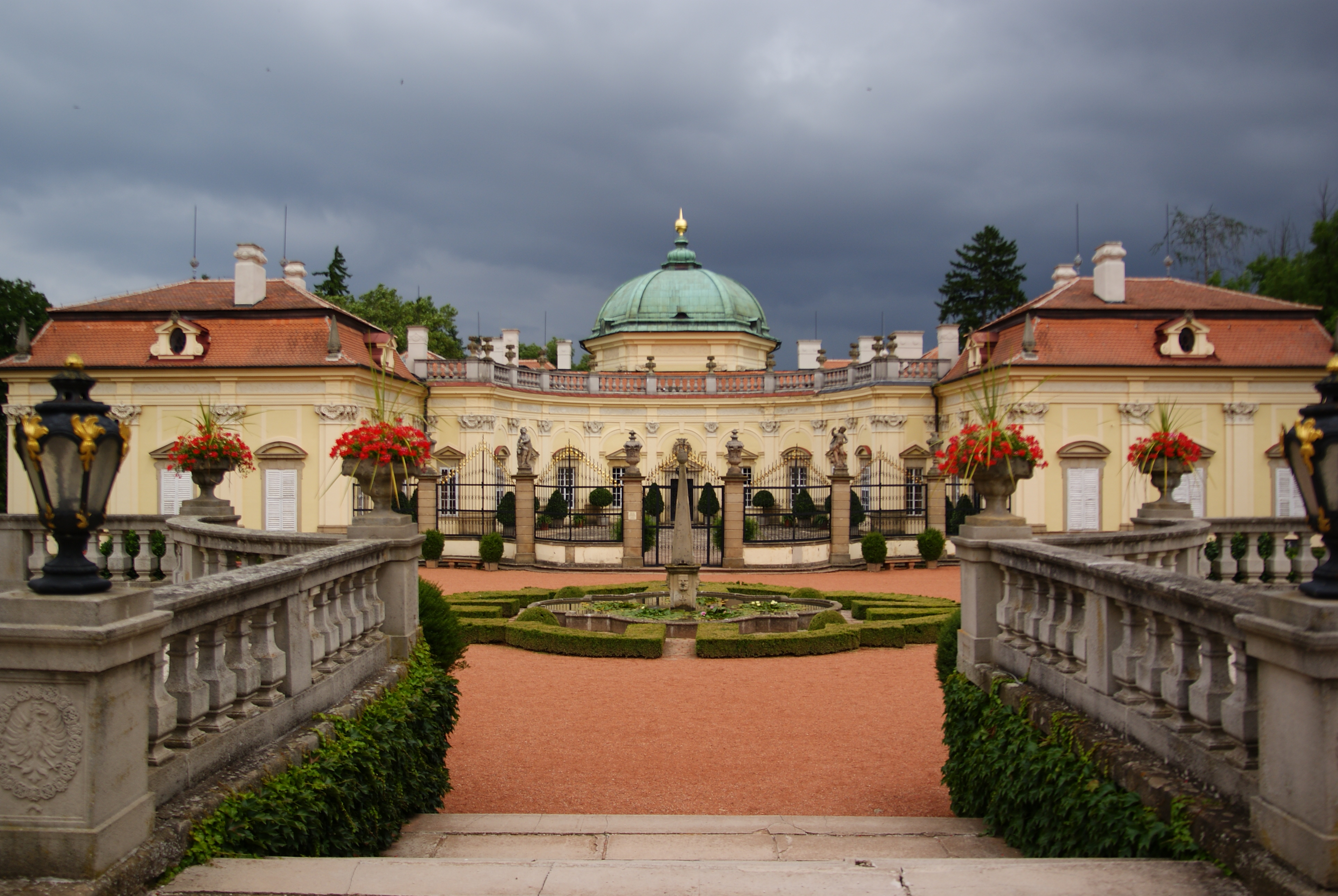 Zámek Buchlovice Buchlovice, Buchlovice 12